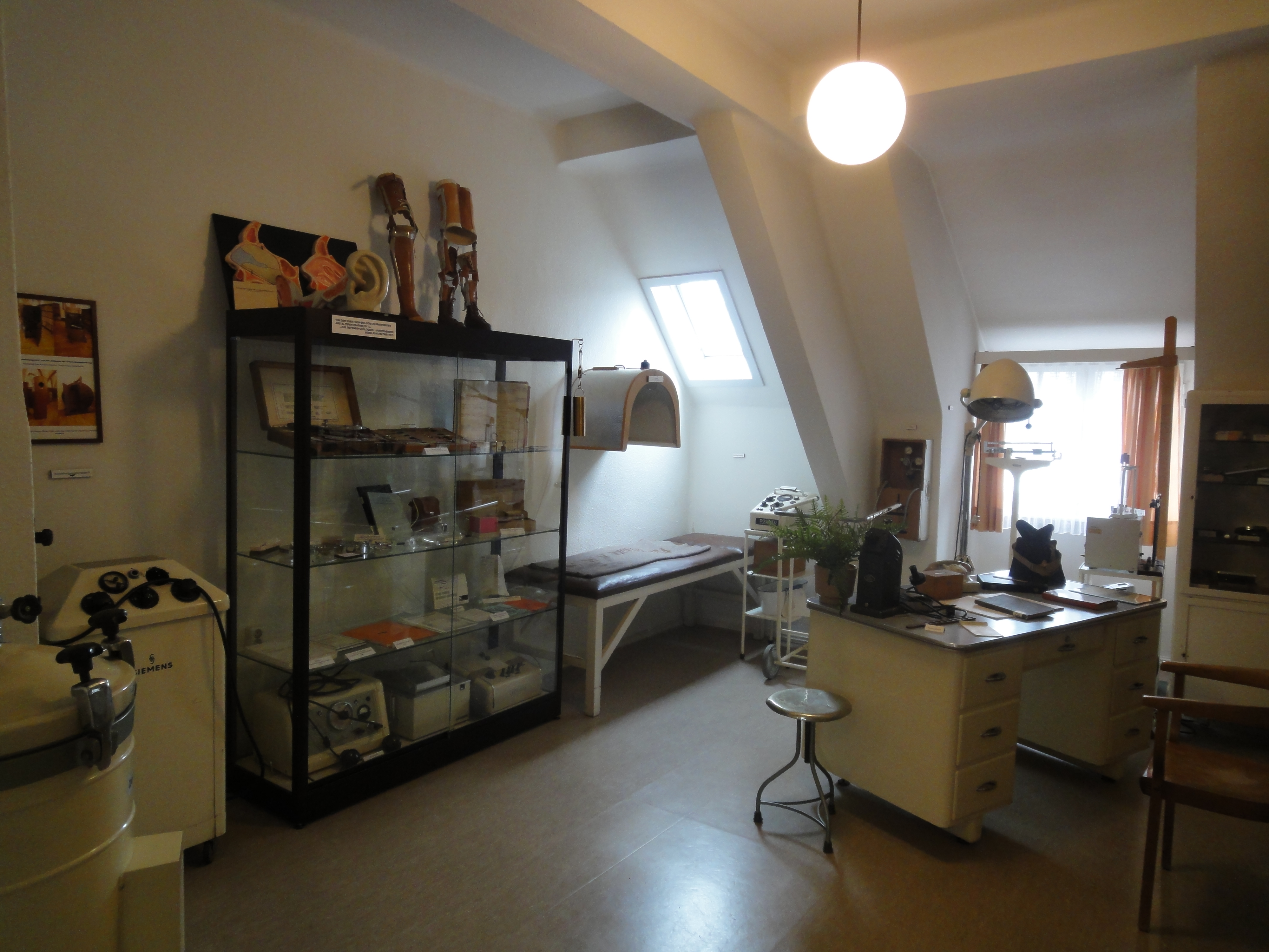 Raum im Psychiatriemuseum Herborn auf dem Gelände von Vitos Herborn.